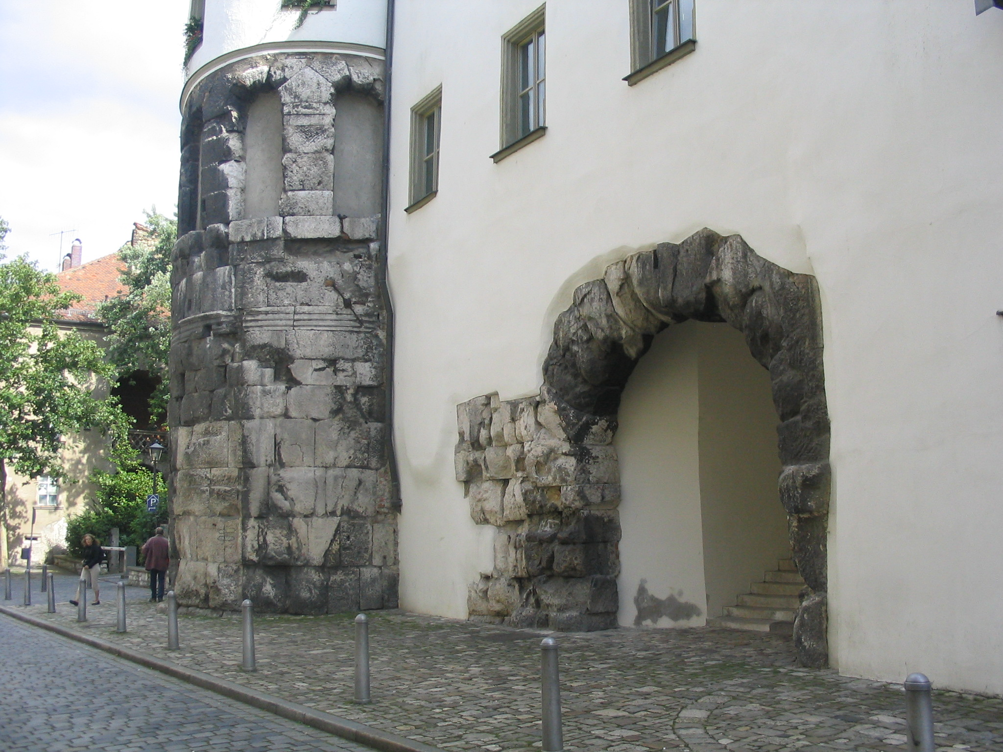 Porta Praetoria in Regensburg. Aufgenommen am 30.07.2007 von Dr. Hagen Graebner